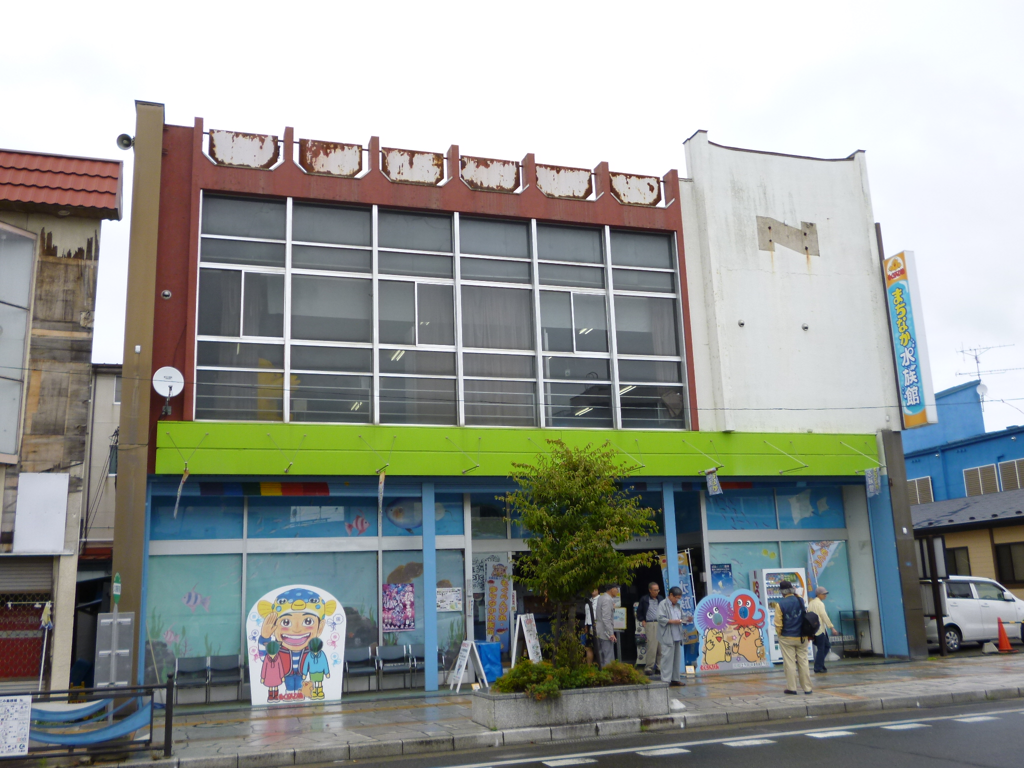 もぐらんぴあ外観